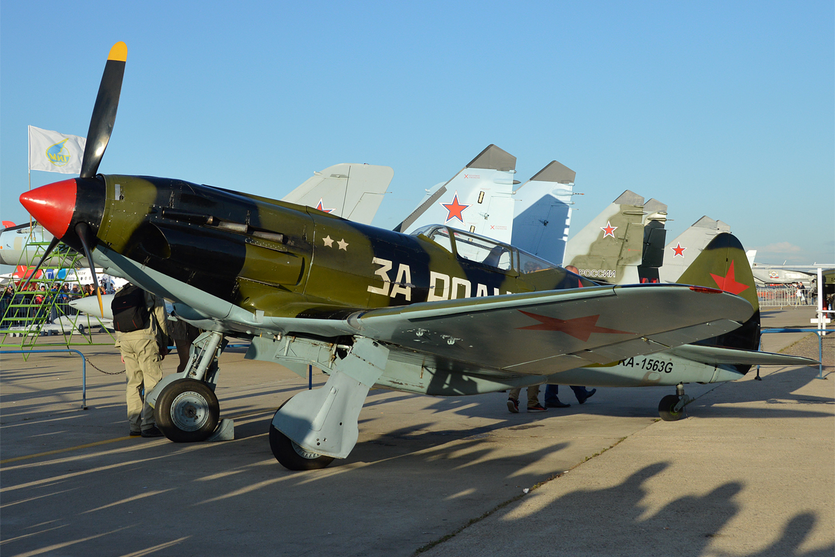 Private, RA-1563G, MiG-3